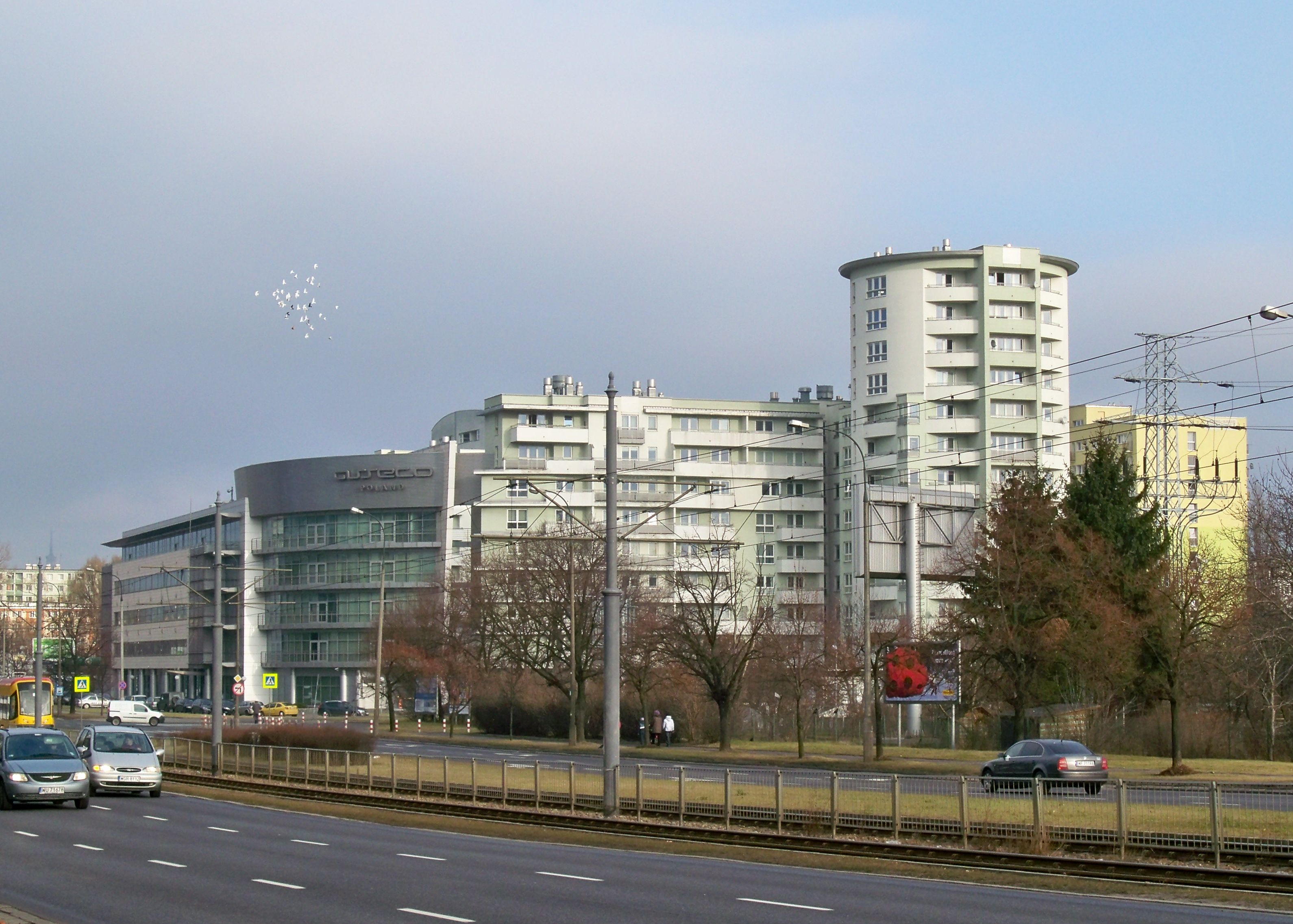 Budynek Prokom Software/Asseco HQ. Ul. Grójecka 127 w Warszawie.